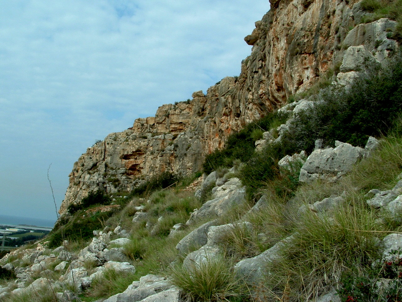 Megadim Cliff Mount Carml - Israel מצוק מגדים מישור החוף הצפוני הר הכרמל